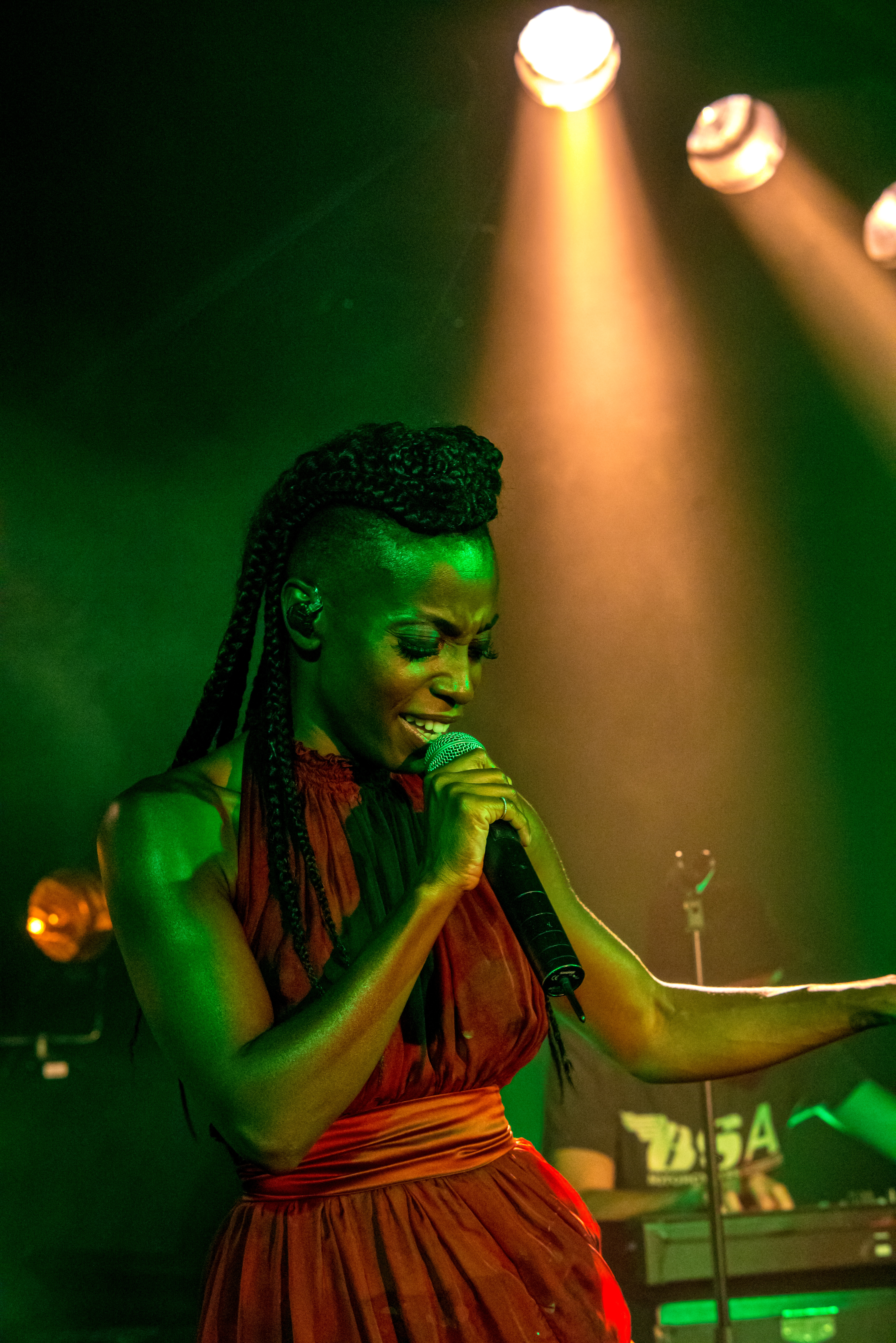 Bilder vom Zelt Musik Festival 2018 in Freiburg im Breisgau Morcheeba Auftritt am 31. Juli 2018 im Speigelzelt